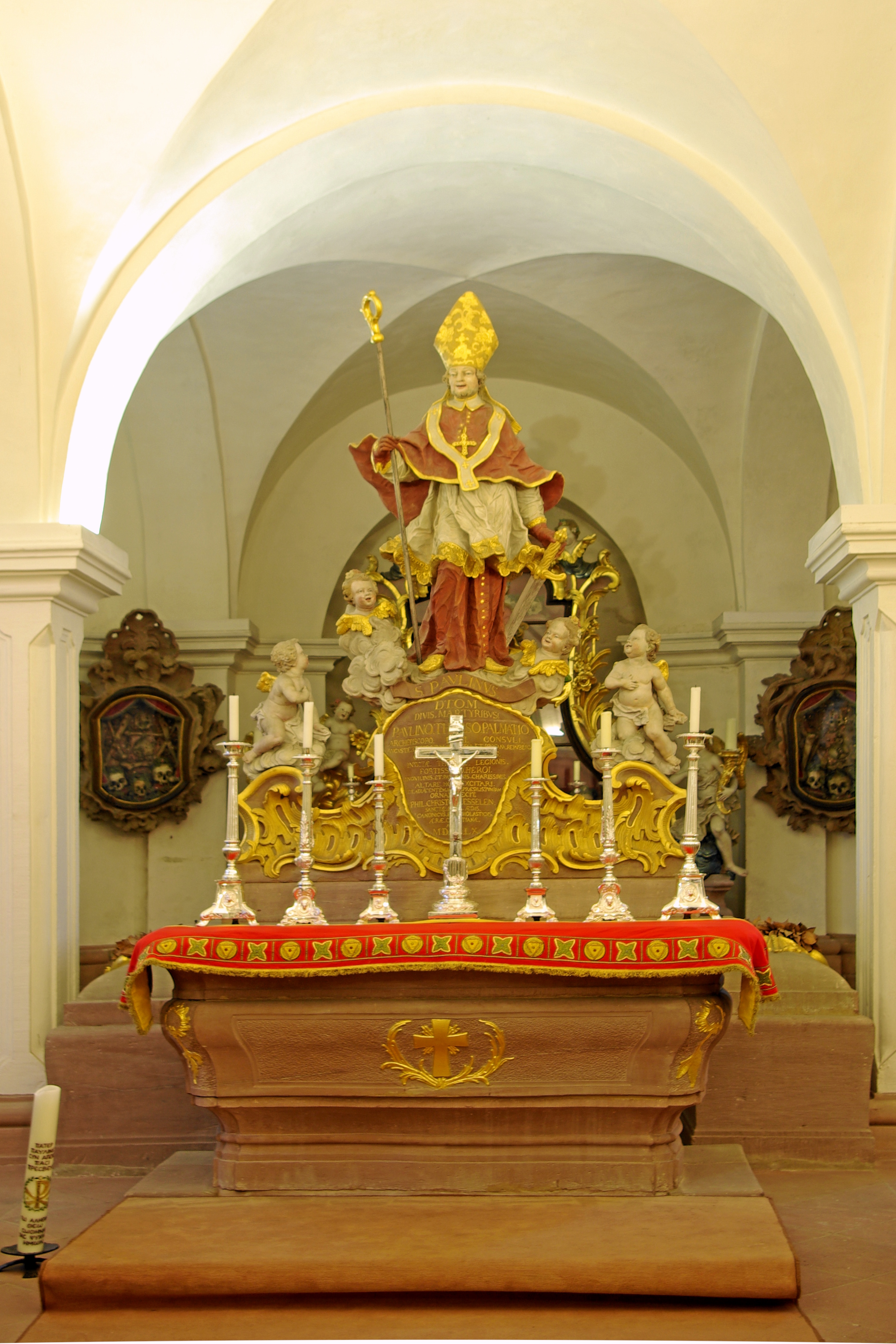 Trier, St. Paulin, Altar des Heiligen Paulinus in der Krypta